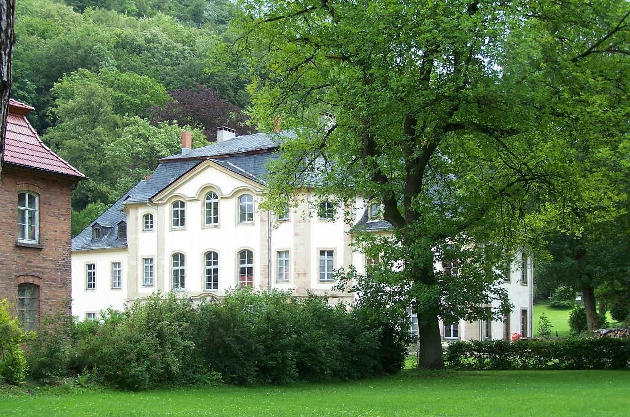 Schloss Glücksbrunn in Schweina, Ansicht von Westen.